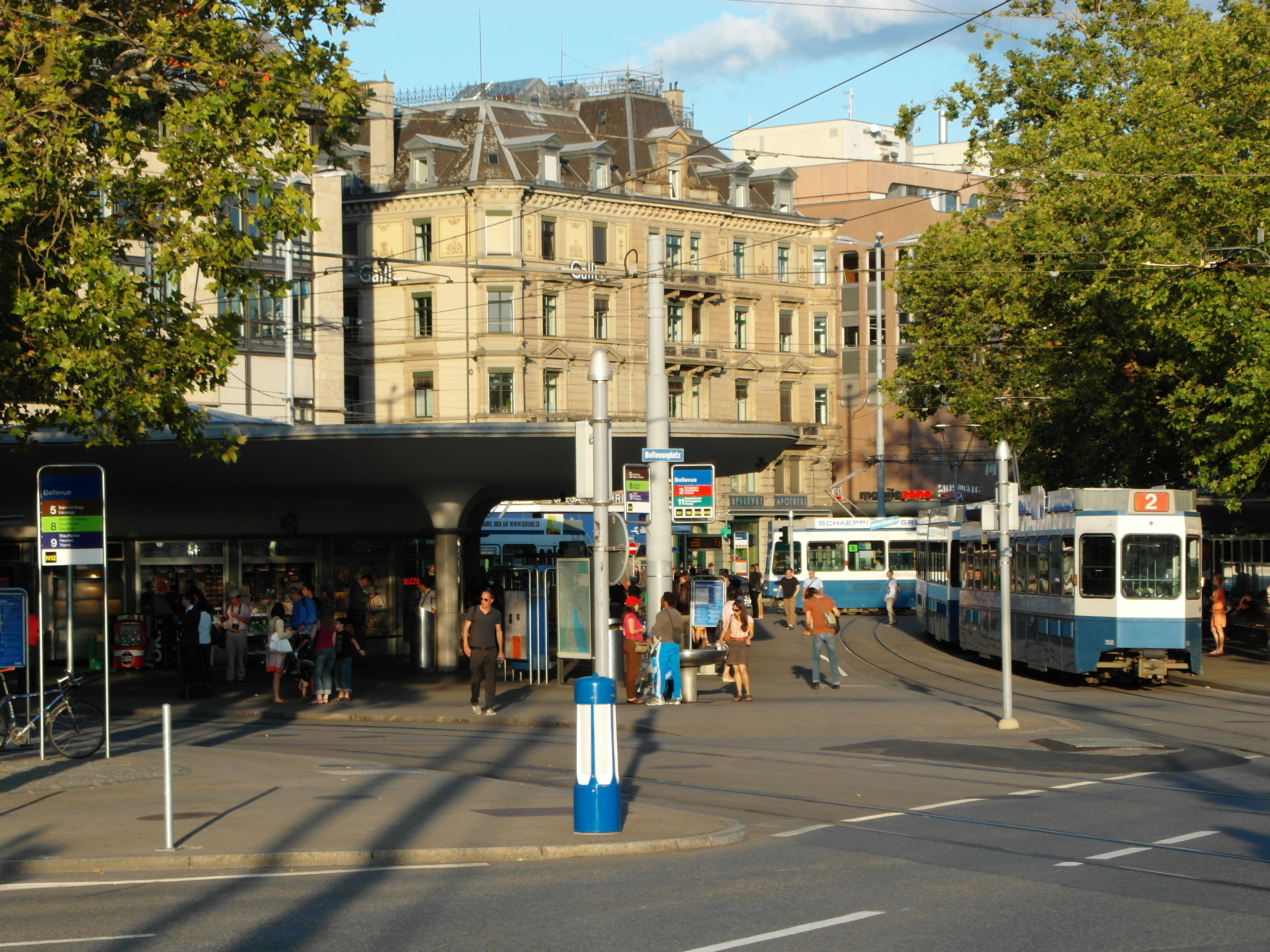 Bellevue in Zürich (Switzerland)